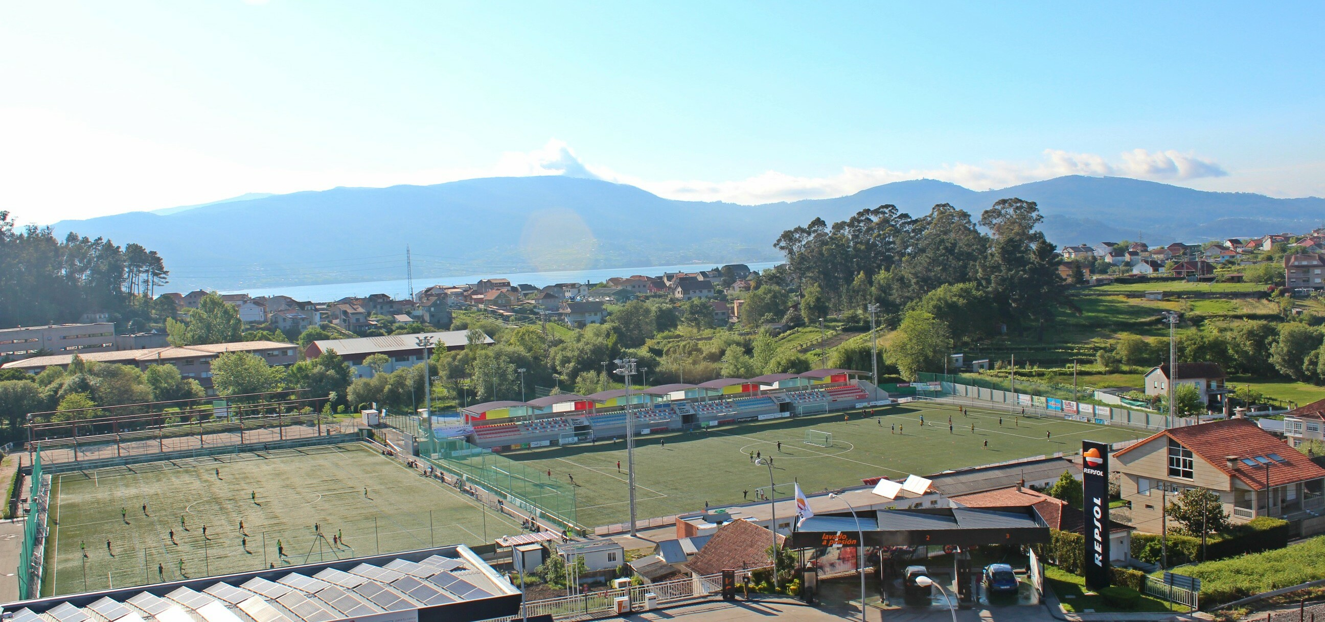 Estadio de St Mariña, Redondela